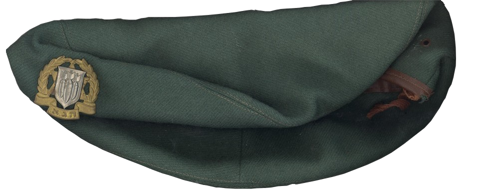 כומתה של הג"א.